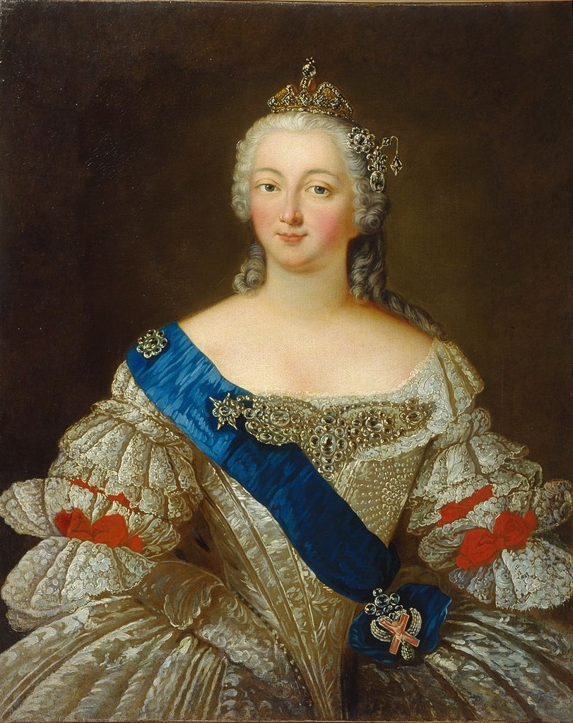 Неизвестный художник. Портрет императрицы Елизаветы Петровны. Ростовский областной музей изобразительных искусств